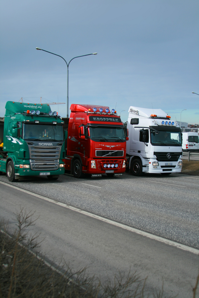 Atvinnubílstjórar hættu aðgerðum á gatnamótum Miklubrautar og Kringlumýrarbrautar laust fyrir klukkan 13 og óku bílum sínum sínum síðan frá gatnamótunum á um 3 km hraða suður Kringlumýrarbraut. Lögreglumenn á mótorhjólum komu á móti bílunum við Nesti í Fossvogi og skipuðu ökumönnunum að hætta aðgerðunum tafarlaust og urðu bílstjórarnir við þeim tilmælum í bili. En í kjölfarið tóku nokkrir bílstjórar sig til, og óku afar hægt eftir Hafnarfjarðarvegi. Er löng bílaröð fyrir aftan þá. Lögreglumenn á mótorhjólum reyna að brjótast í gegnum bílaröðina til að ná til bílstjóranna.